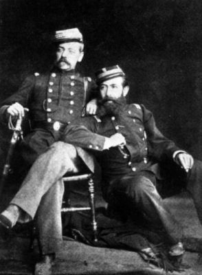 Domingo De Toro Herrera, junto a Ricardo Santa Cruz